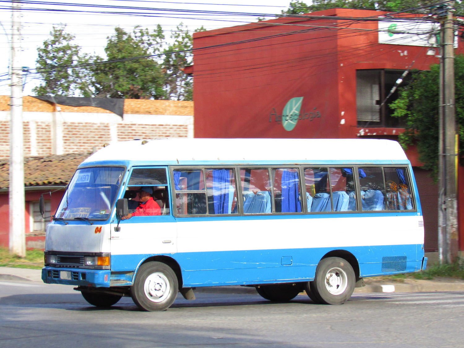 Asia AM 815 Combi bus (#04) in Chile. Built 1993.